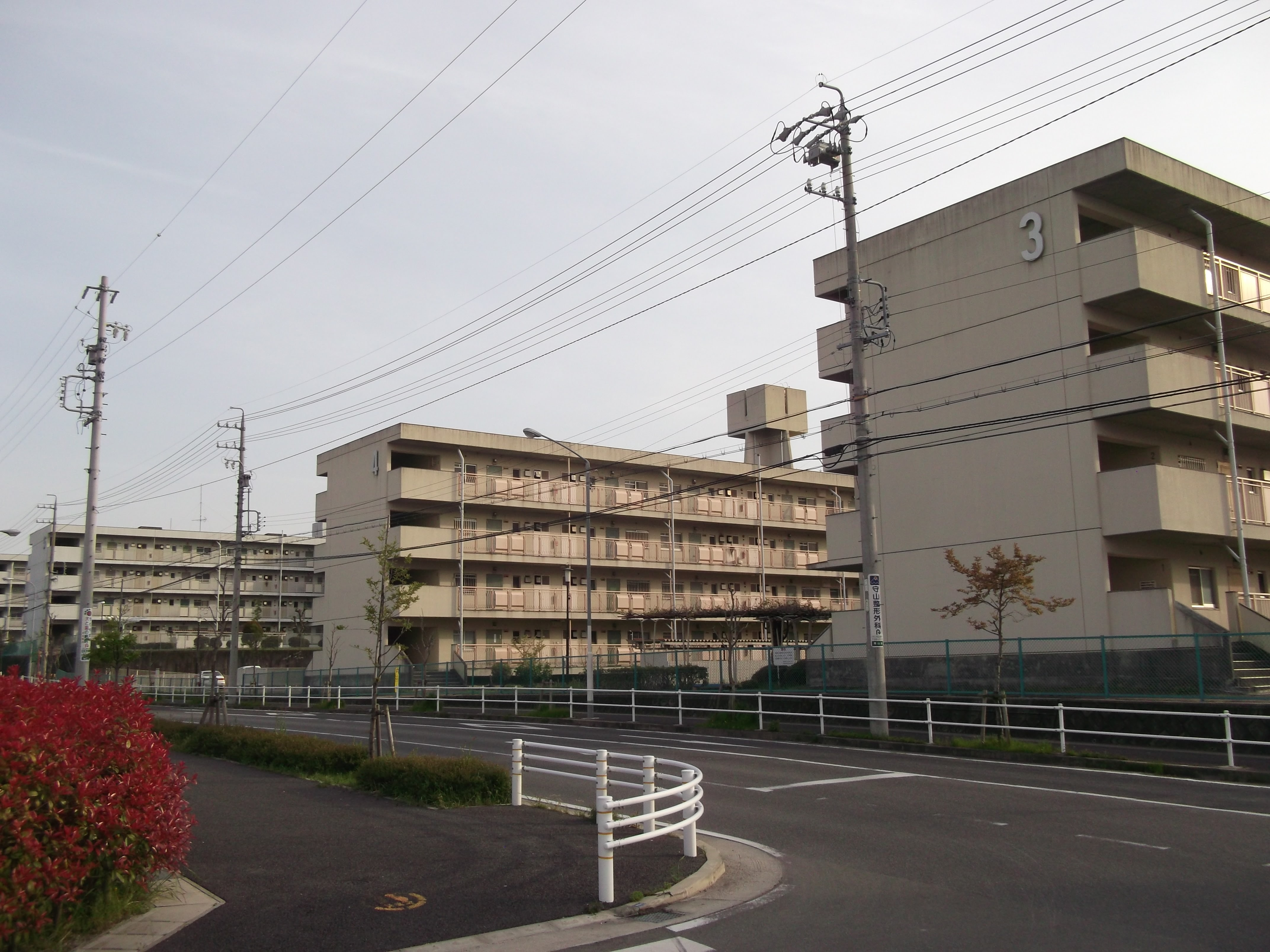 愛知県営吉根住宅